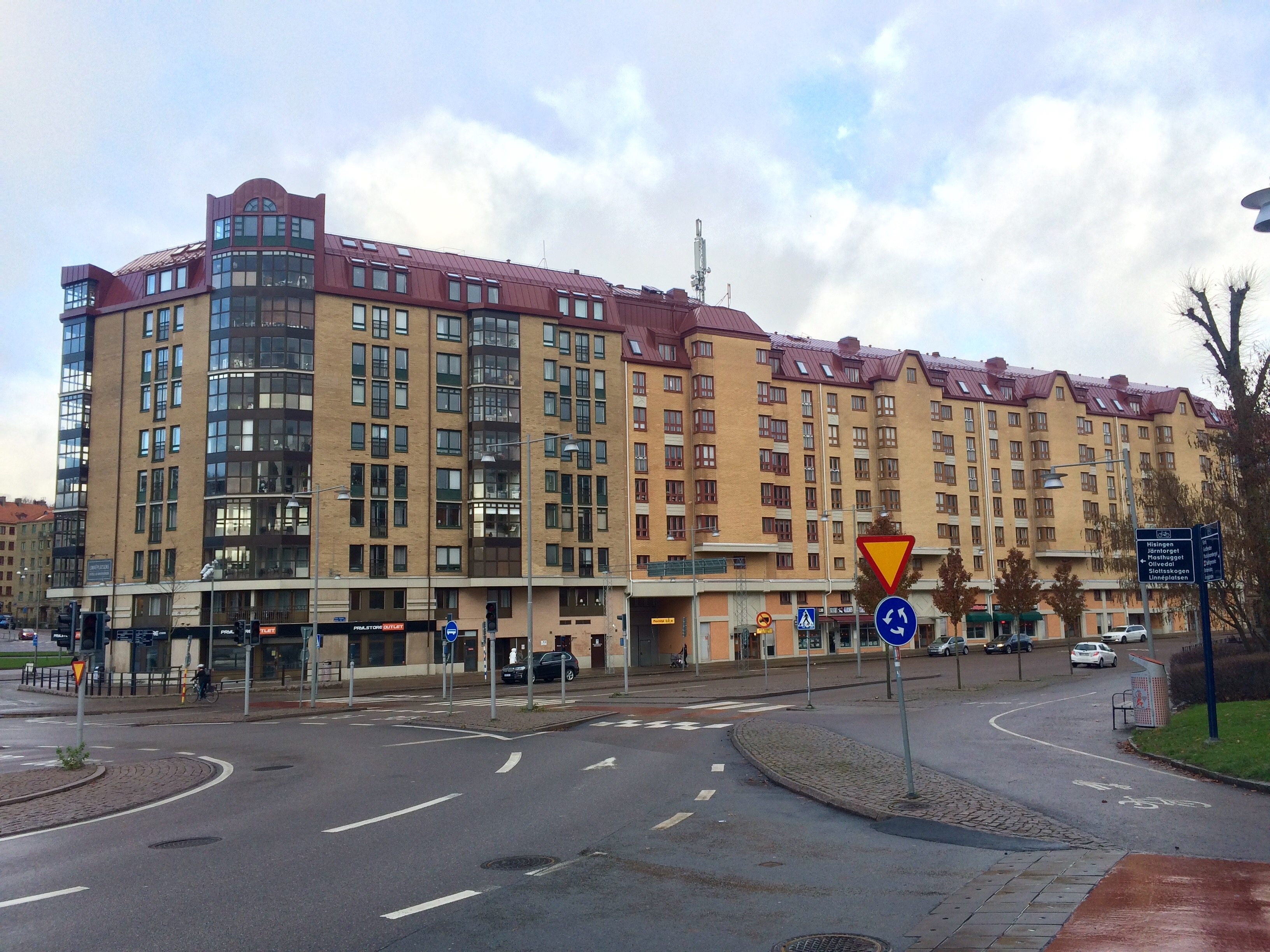 Linnéplatsen 8-9/Övre Husargatan 45-29, Kommendantsängen, Göteborg.